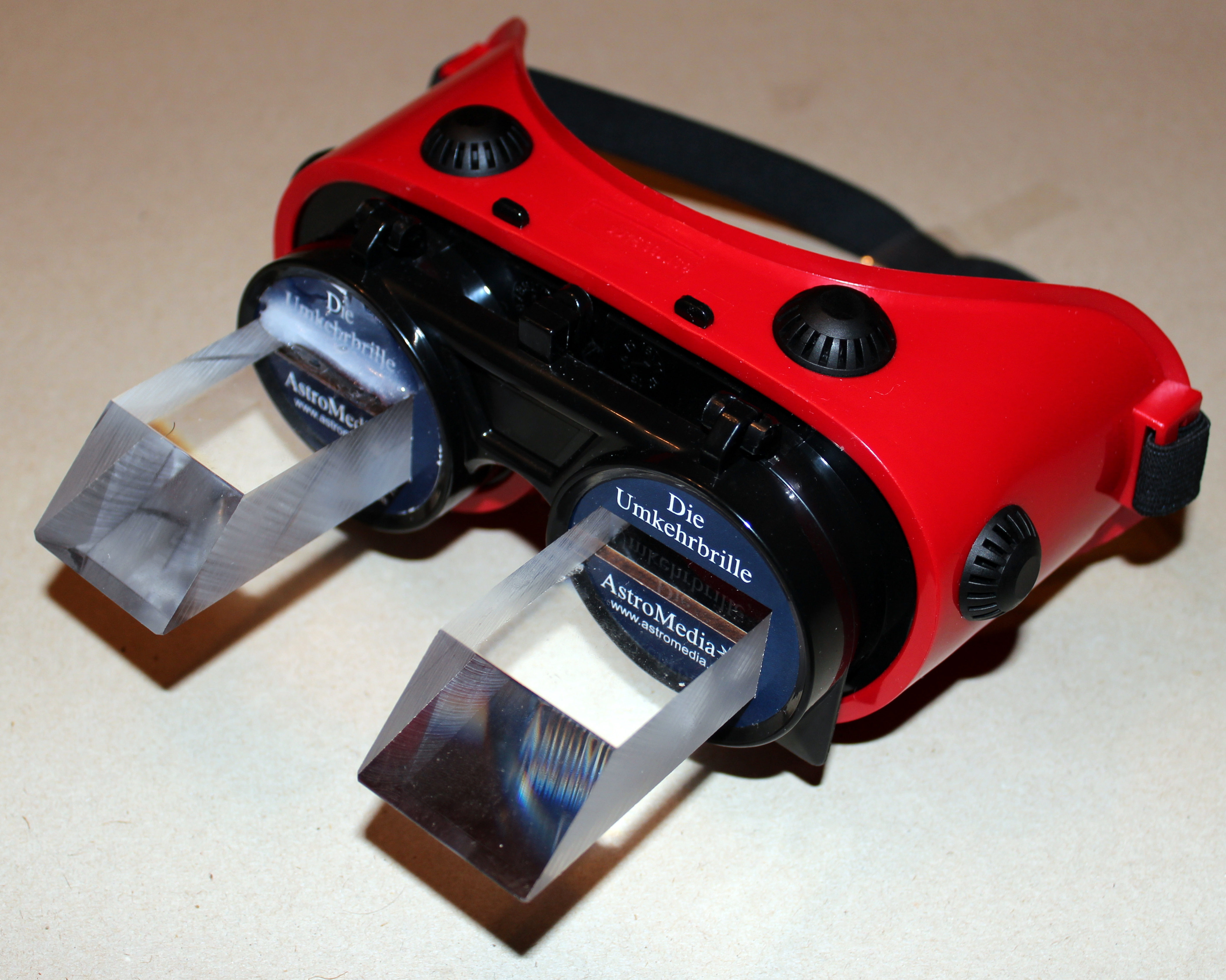 Umkehrbrille, selbst gebastelt